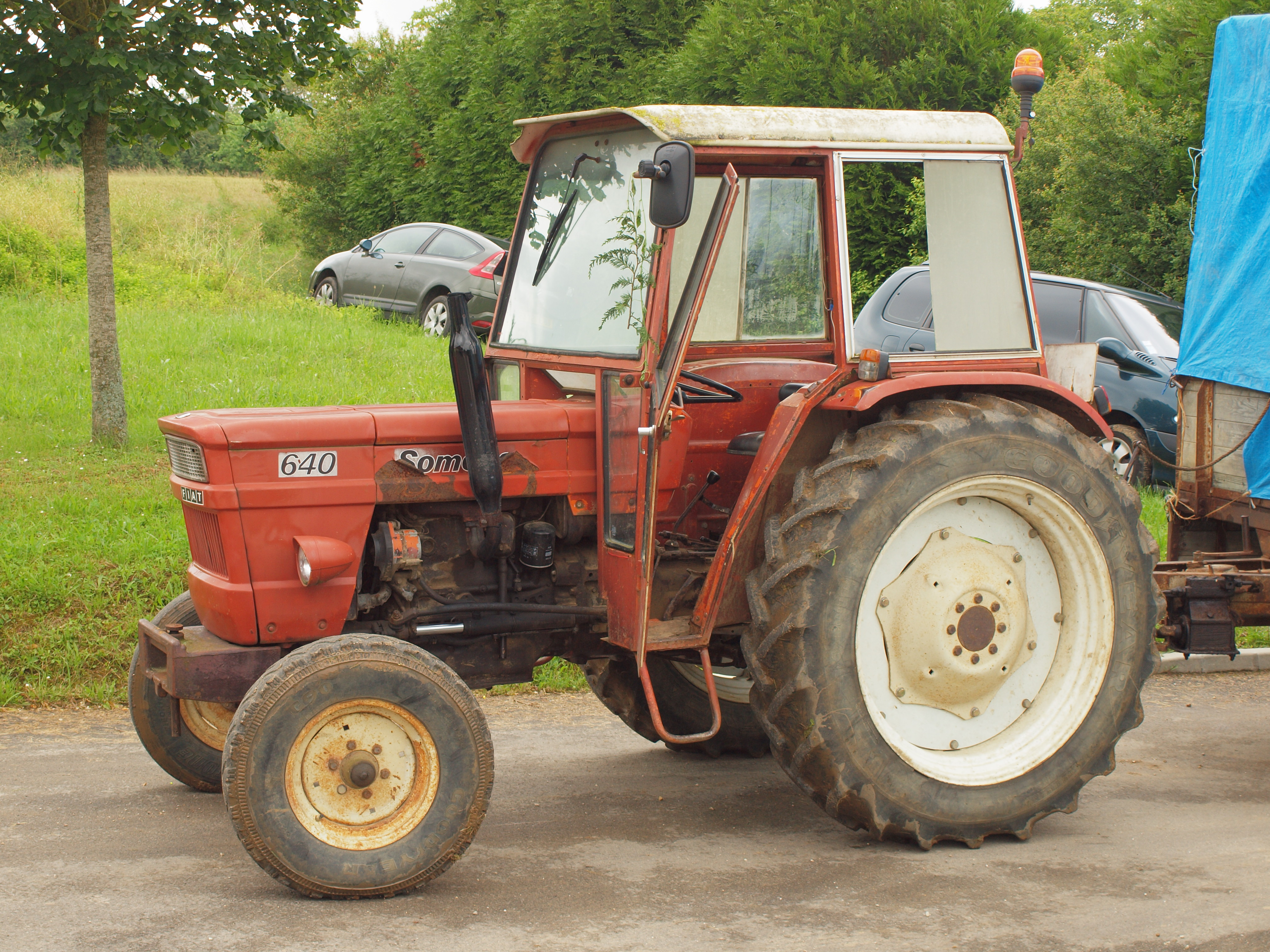 Rassemblement 2016 des véhicules anciens à Villemanoche (Yonne, France)